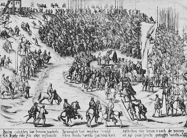 Holzschnitt: Melaten - Enthauptung des Hieronymus Michaelis (1588)